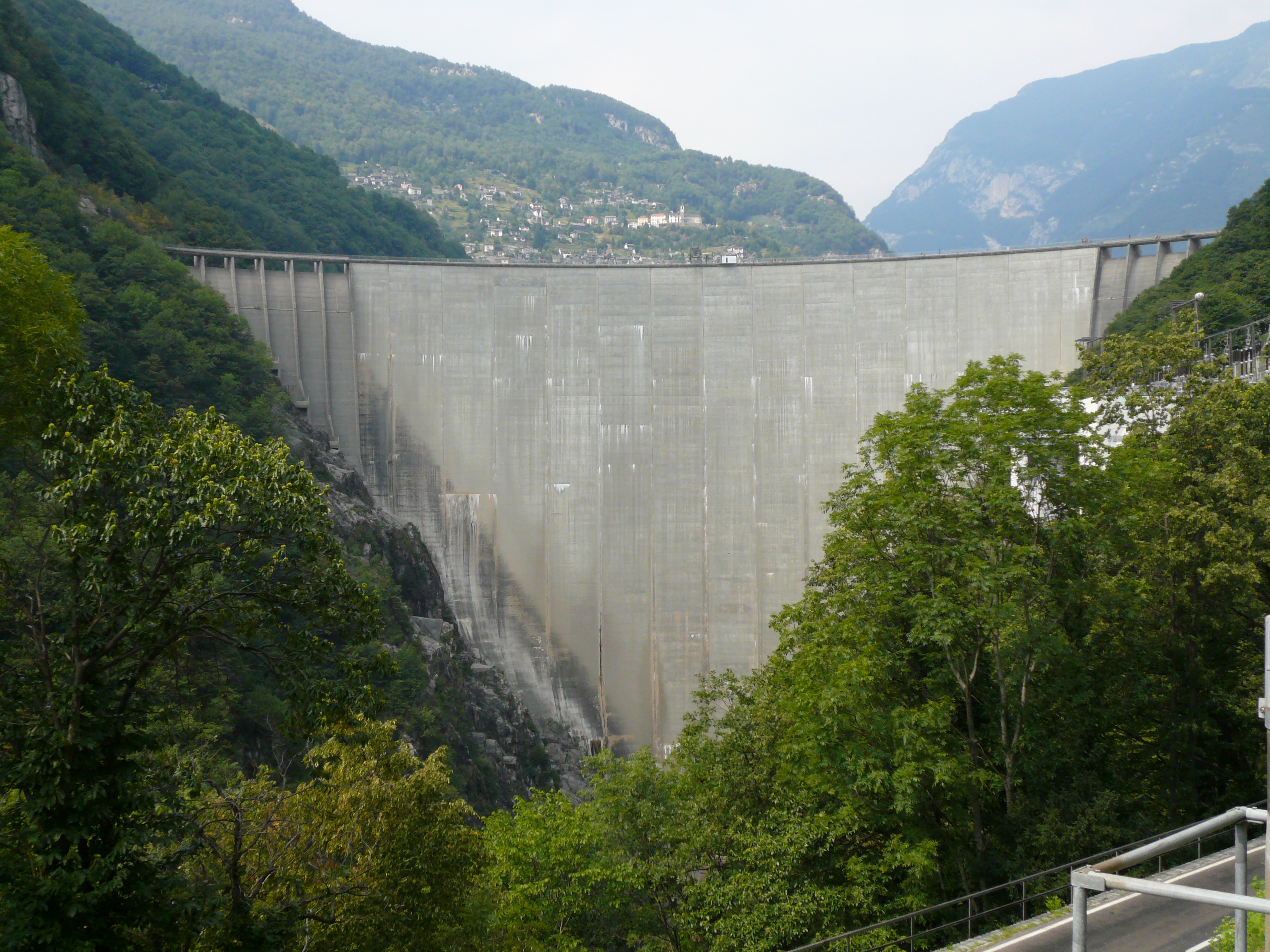 barrage de Contra vu depuis la route du val Verzasca